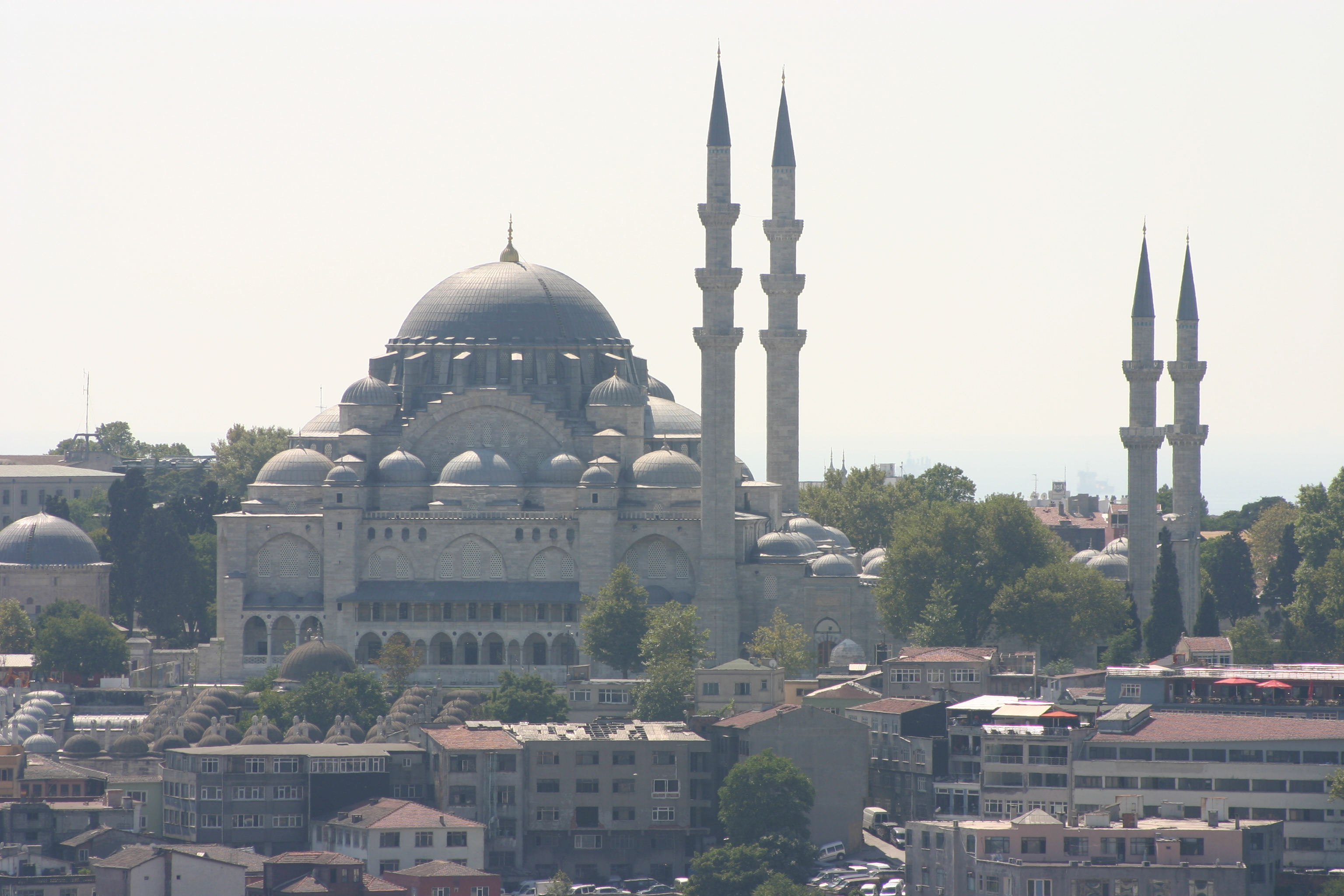 Vista da Mesquita Süleymaniye a partir da Torre Gálata